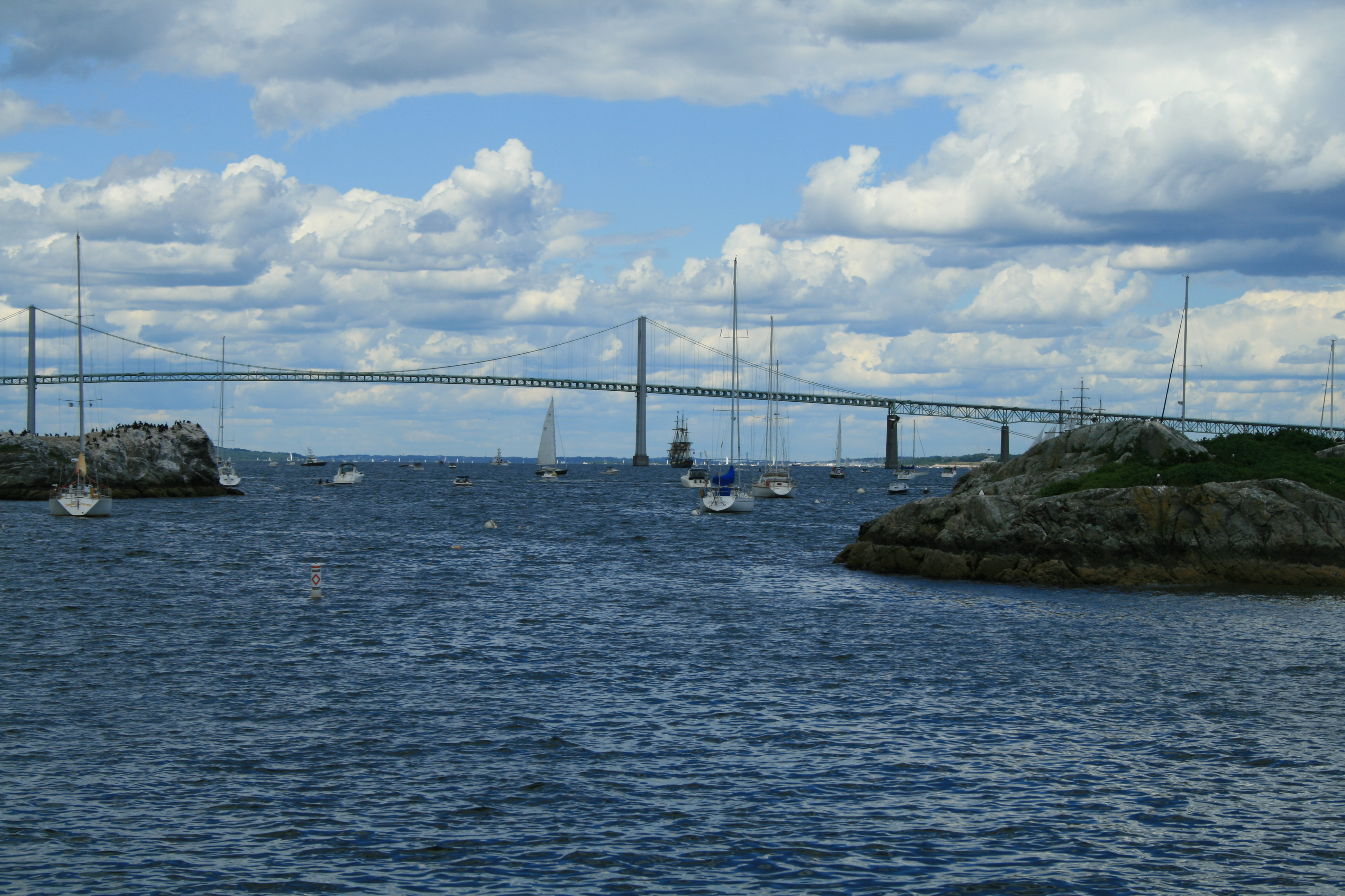 Bridge and Narragansett Bay